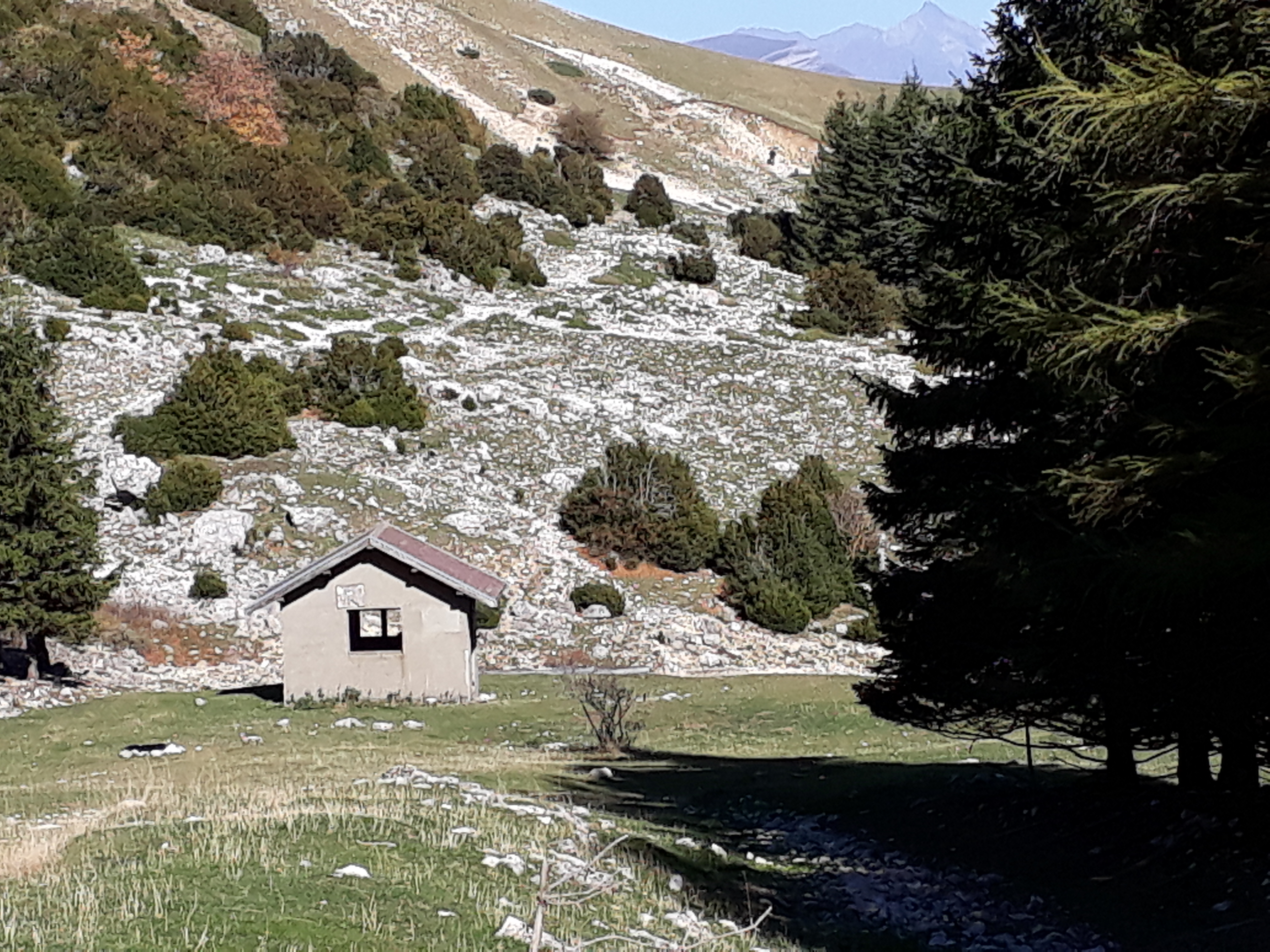 cabine de l'ancien téléski de la station du Rocou, aujourd'hui désaffectée. A droite, l'alignement d'épicéas plantés comme brise vent pour protéger la piste du téléski.